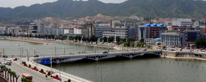 河北省张家口市清水河上桥梁之通桥。